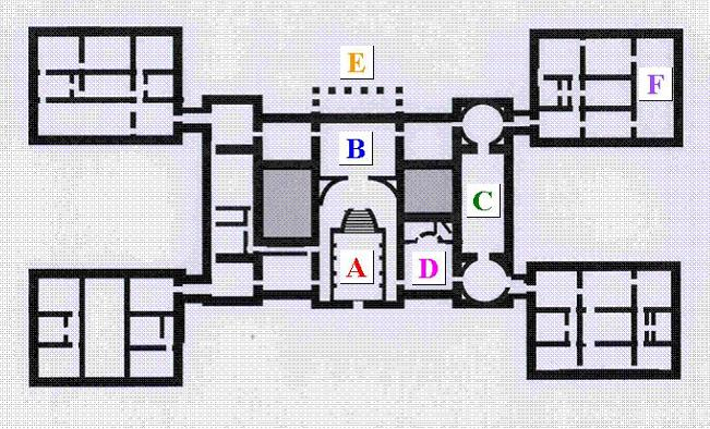 Plan de Holkham Hall (William Kent, vers 1735)